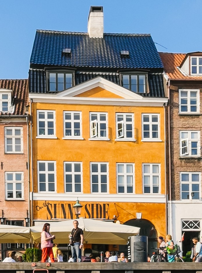 Nyhavn 31 in Copenhagen, Denmark Copenhagen, Denmark